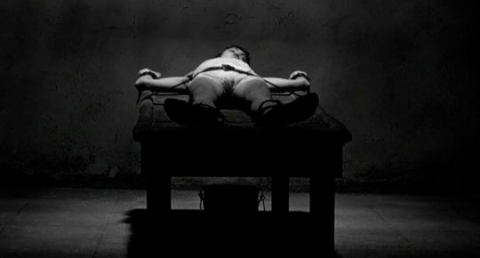 Screenshot from Mamma Roma directed by Pier Paolo Pasolini